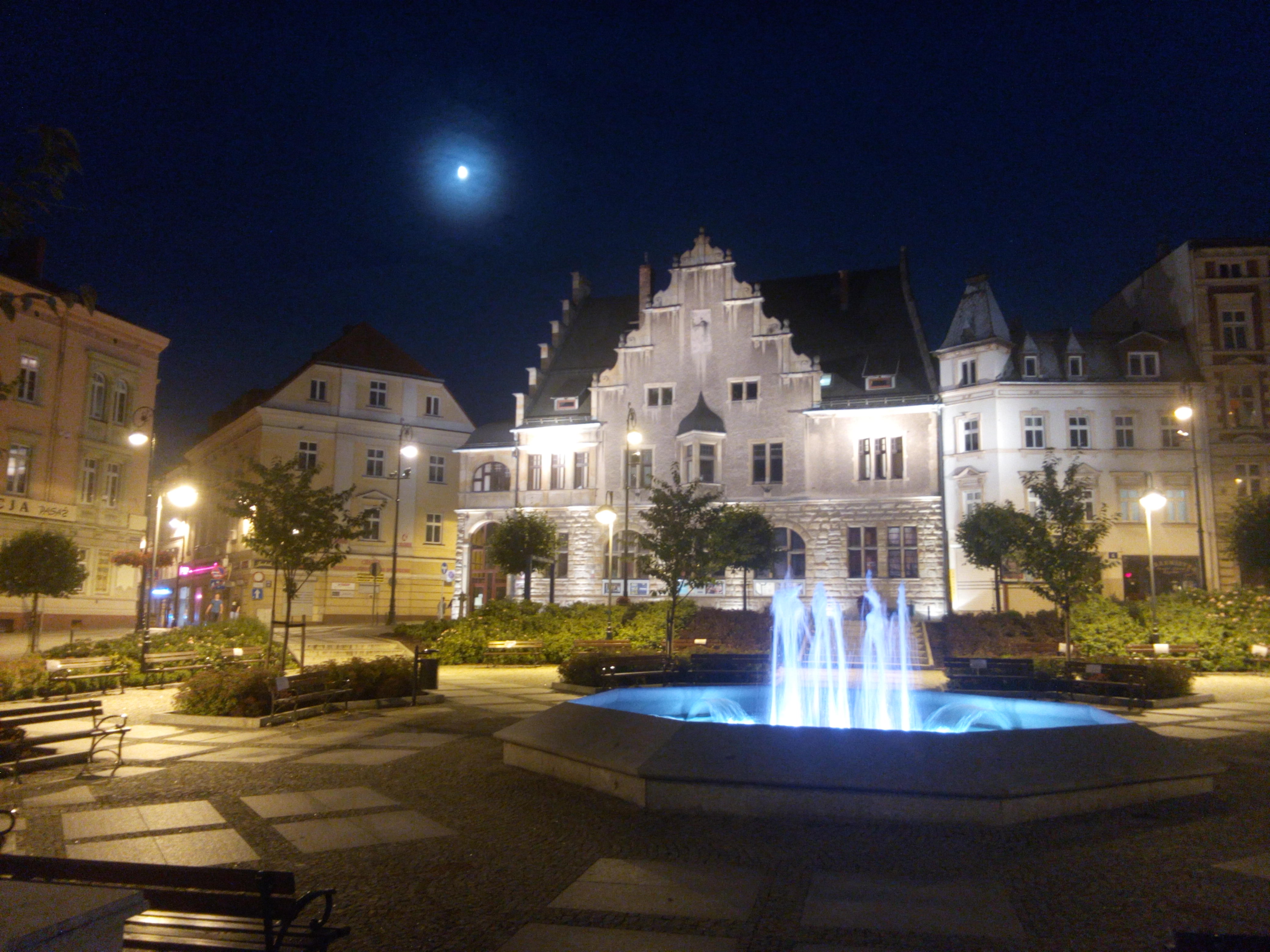 Część Placu Magistrackiego w nocy